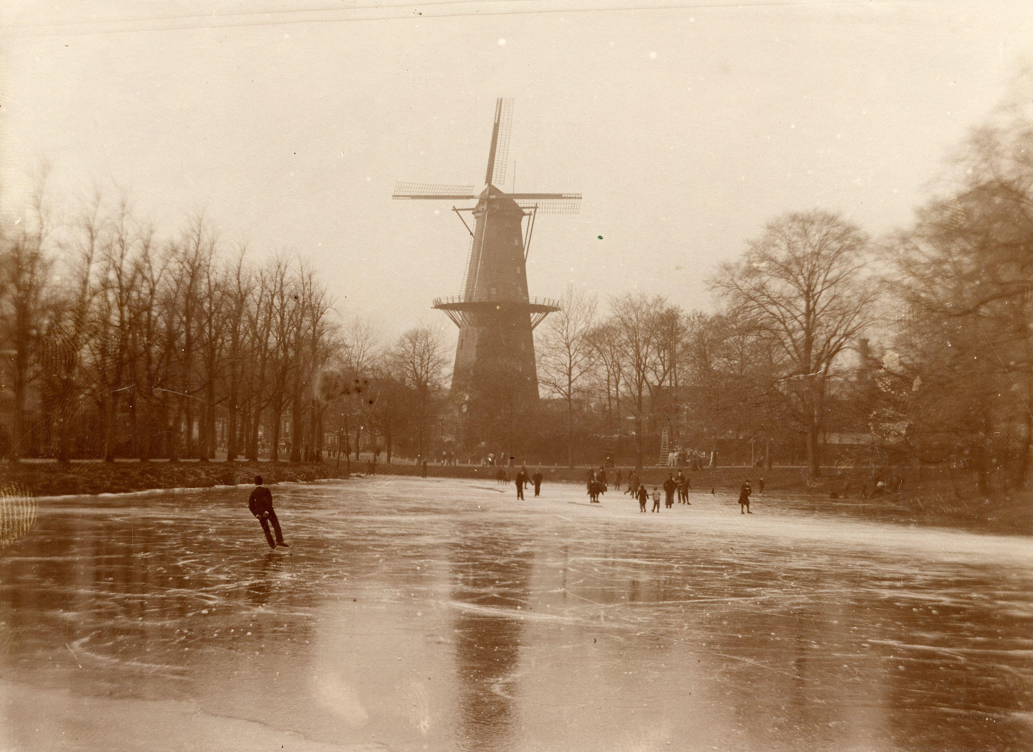 Zoeterwoudsesingel met molen De Oranjeboom te Leiden. Een foto uit een serie van 33 Leidse stadsgezichten door W. Massink Az., origineel 10 x 14 cm, 1907.